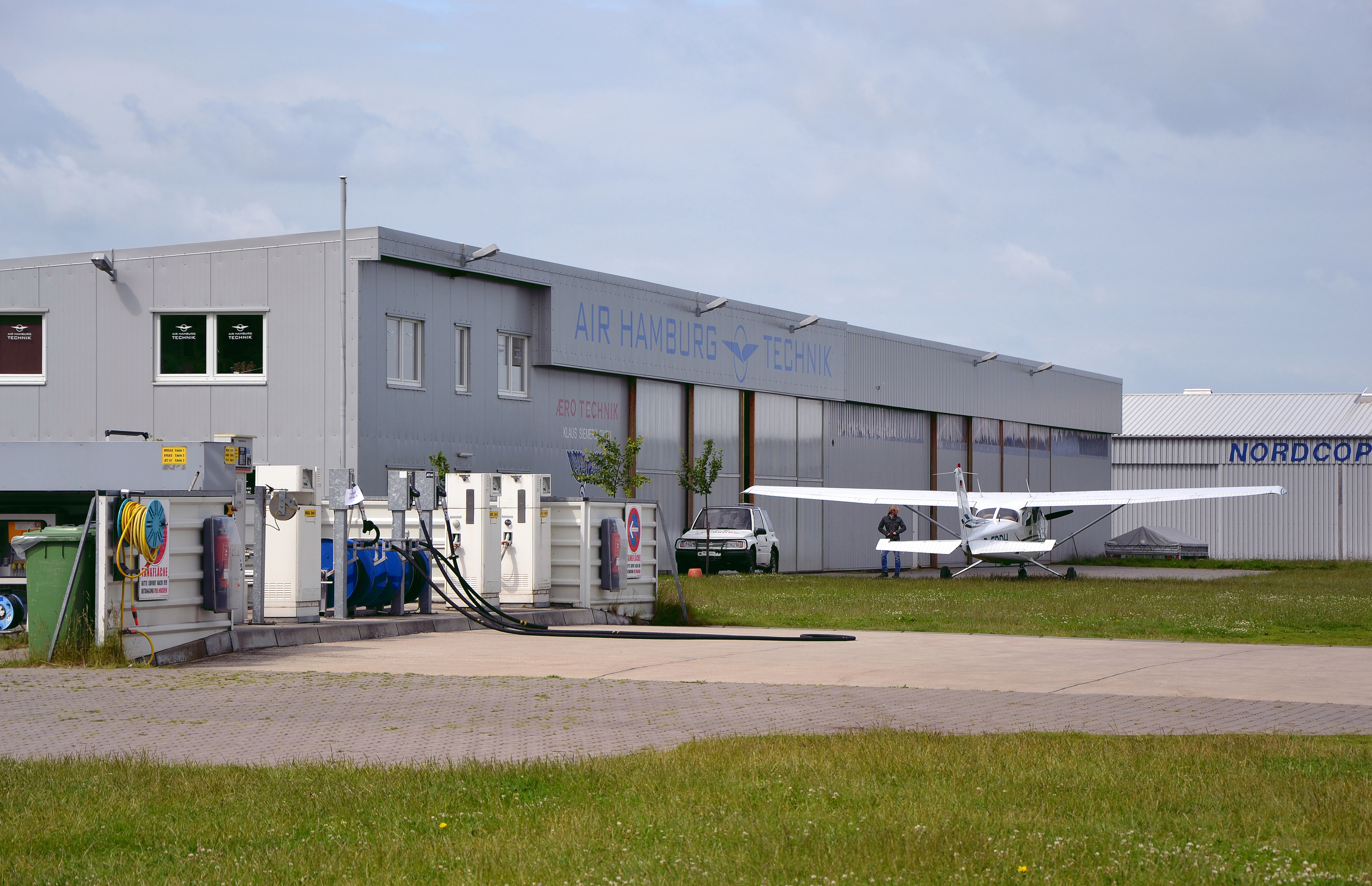 Der Technikhanger von Air Hamburg auf dem Gelände des Flugplatzes Uetersen